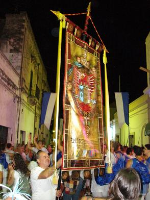 Il palio del Torneo dei Rioni 2006; i contradaioli del rione Giudea portano in trionfo il palio vinto nel torneo. Foto personale --Galiano.M 11:51, 17 mag 2007 (CEST)Galiano M.